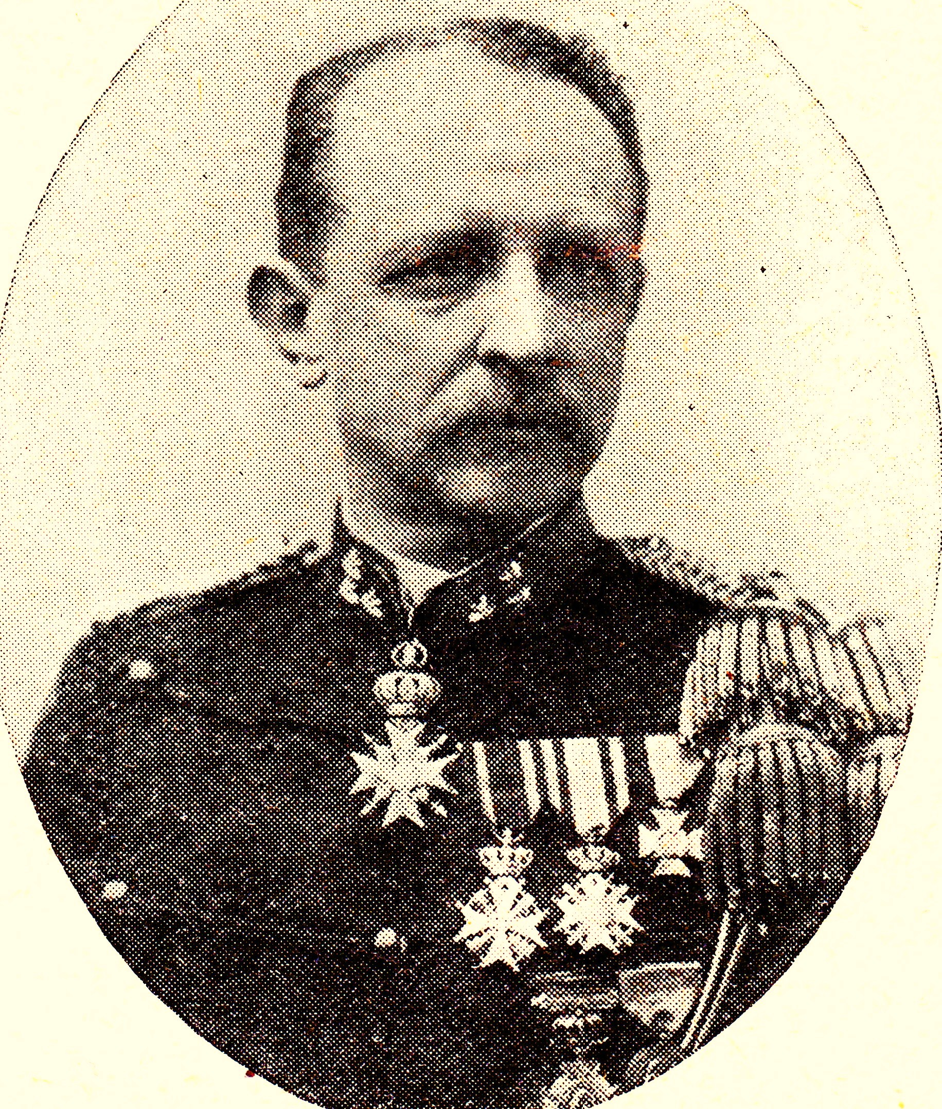 Generaal majoor J.F.D. Bruinsma